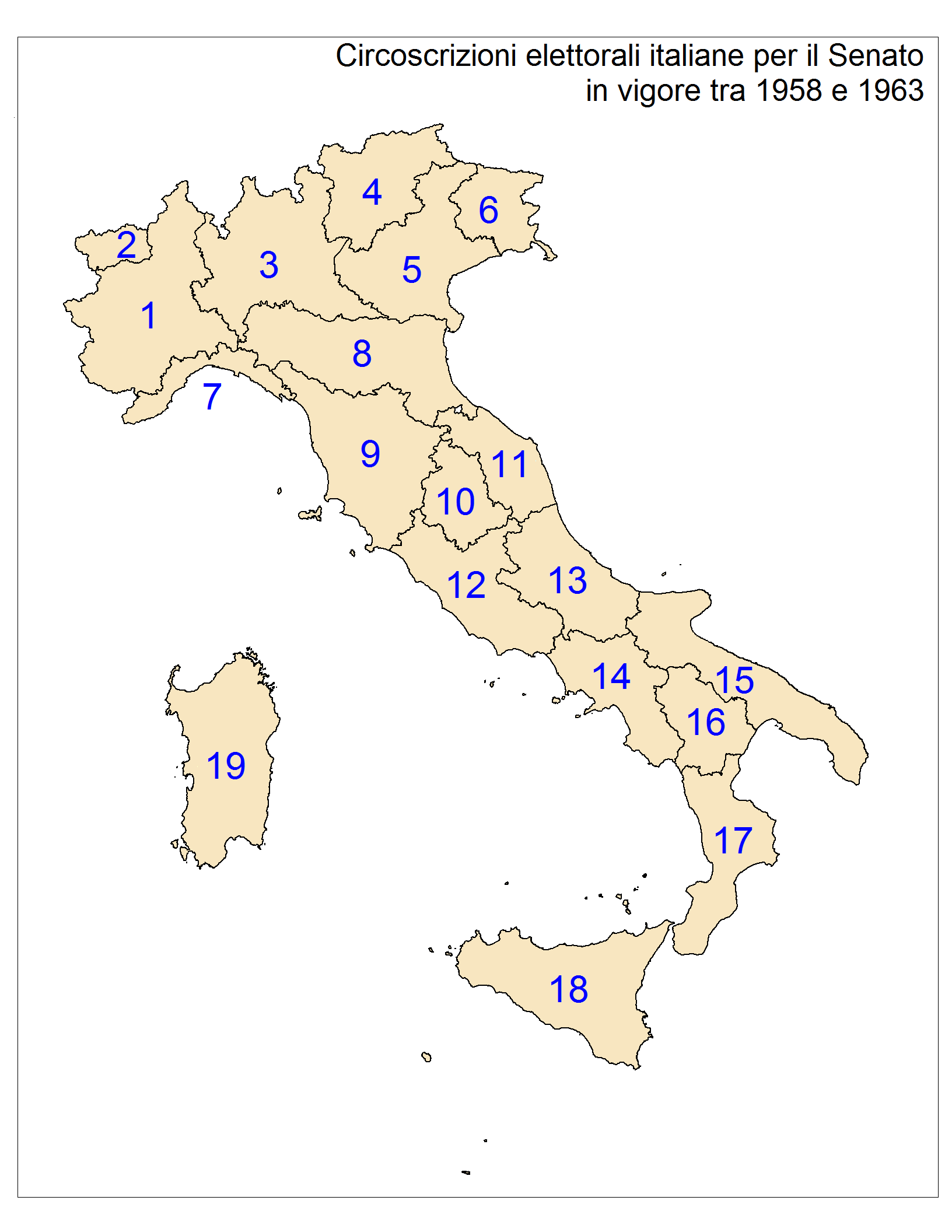 Mappa delle circoscrizioni elettorali italiane in vigore trail 1958 e il 1963 per il Senato della Repubblica.